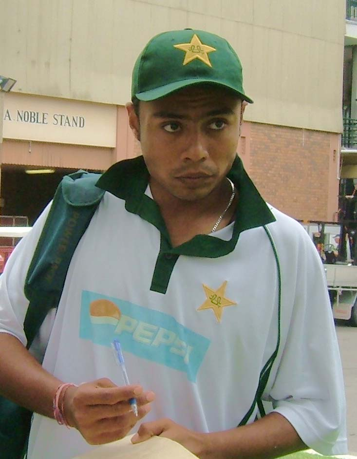 Danish Kaneria